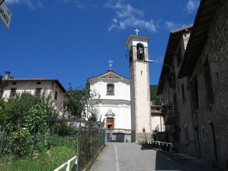 Gerosa, provincia di Bergamo, la chiesa parrocchiale di Santa Croce.